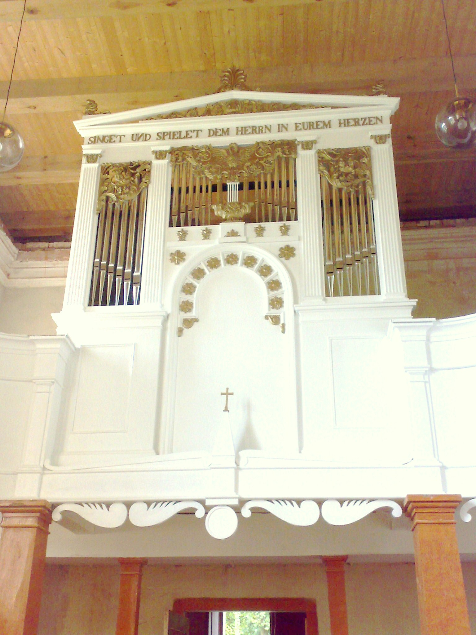 Ansicht der Weitendorfer Winzer-Orgel